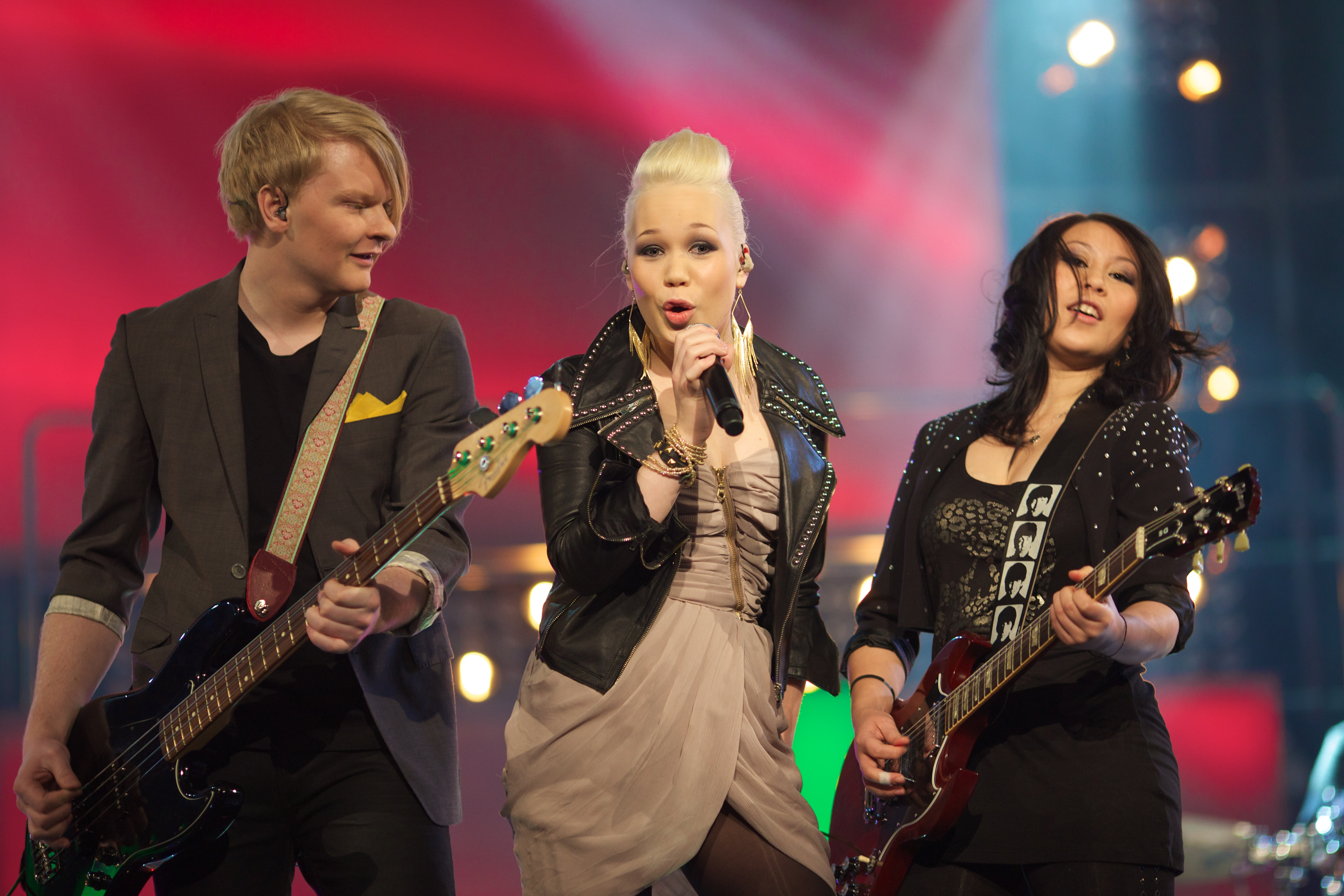 The BlackSheeps i Melodi Grand Prix 2011, Skien